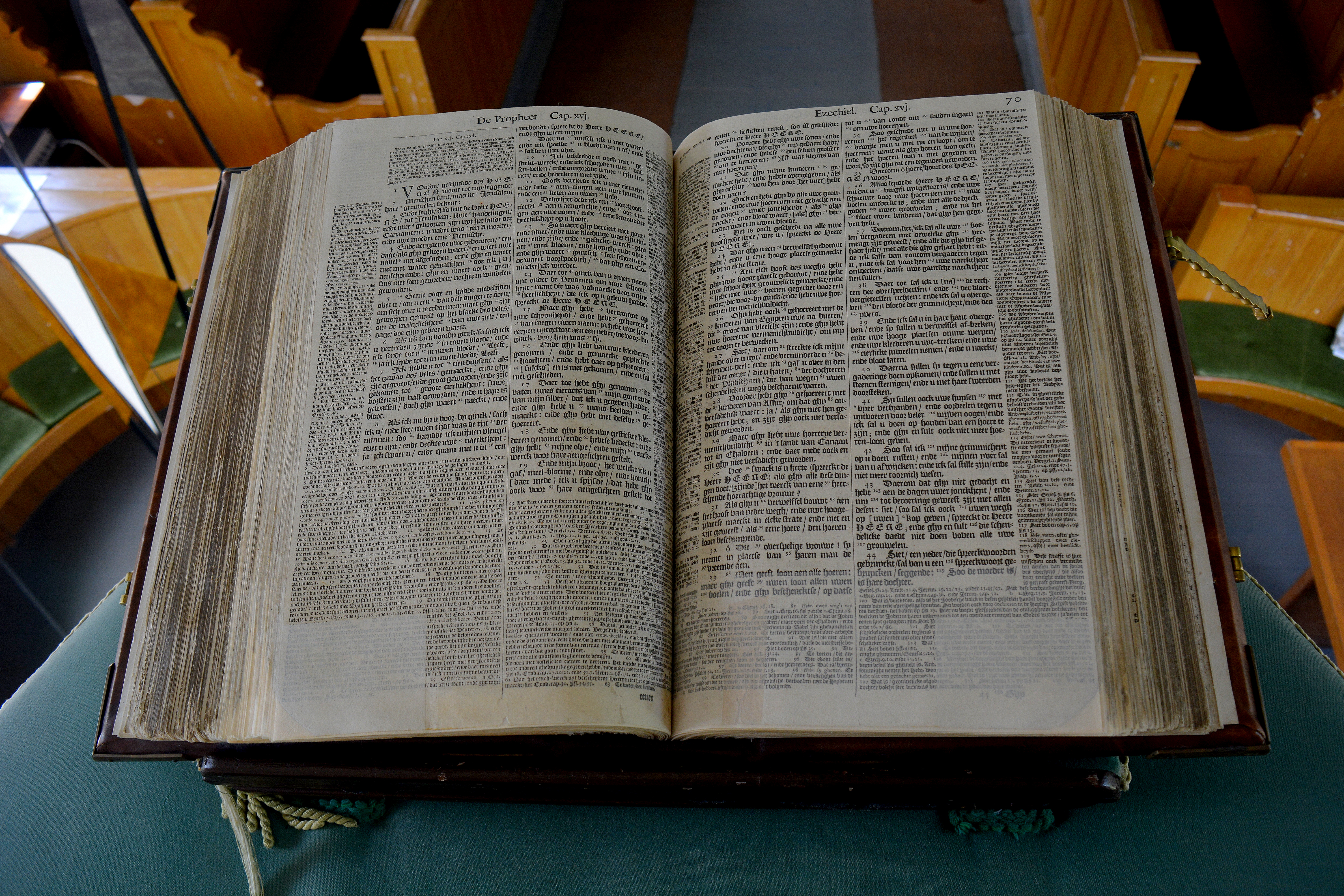 Mariakerk, Blessum, kanselbijbel